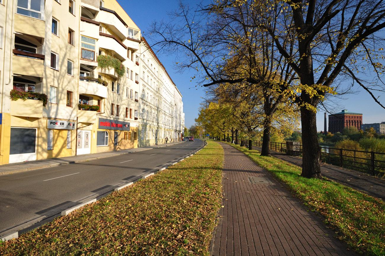 Wybrzeże Wyspiańskiego jesienią. Za kilka dni drzewka będą łyse.